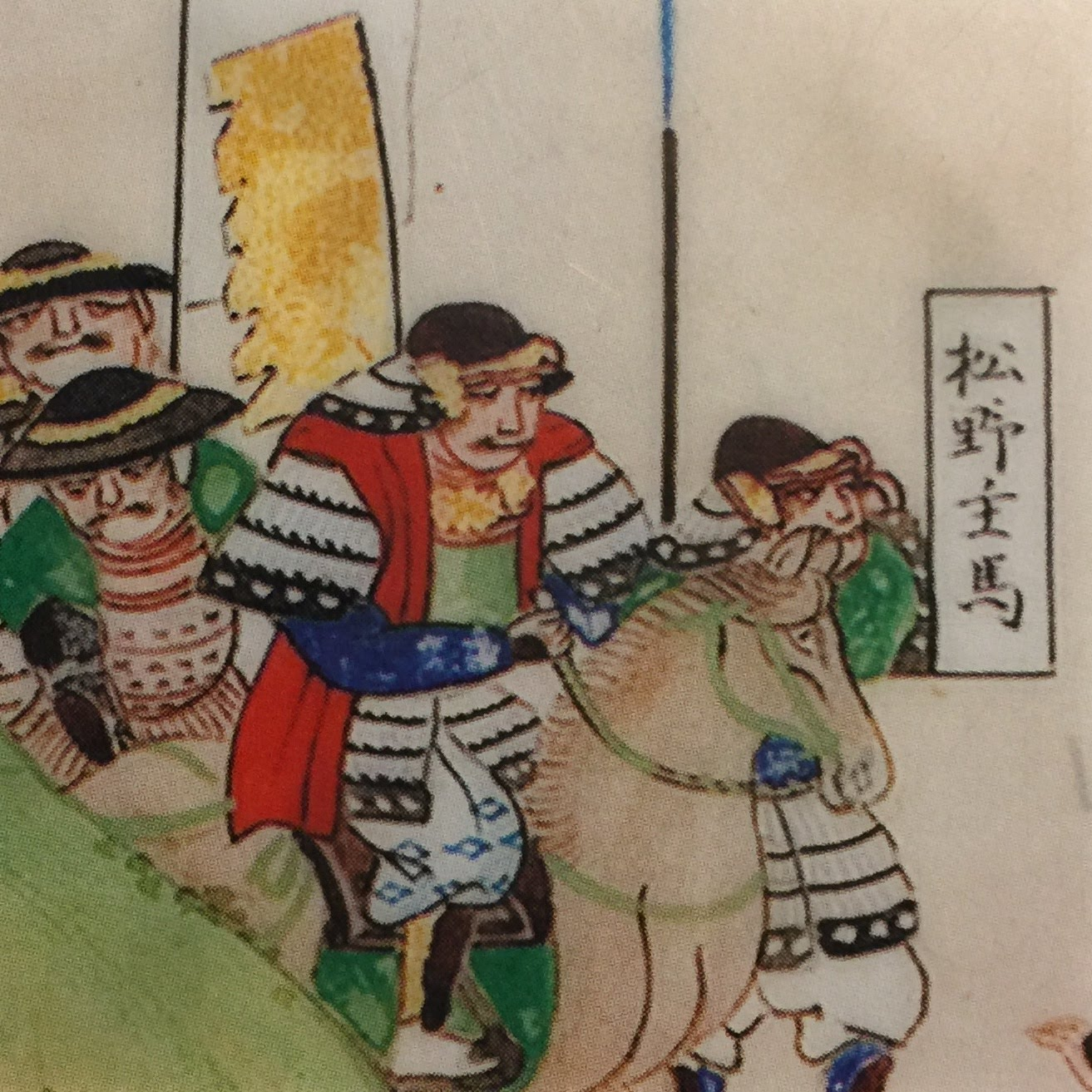 関ヶ原合戦図屏風（関ケ原町歴史民俗資料館本）に描かれた、小早川秀秋家臣の松野主馬（重元）。